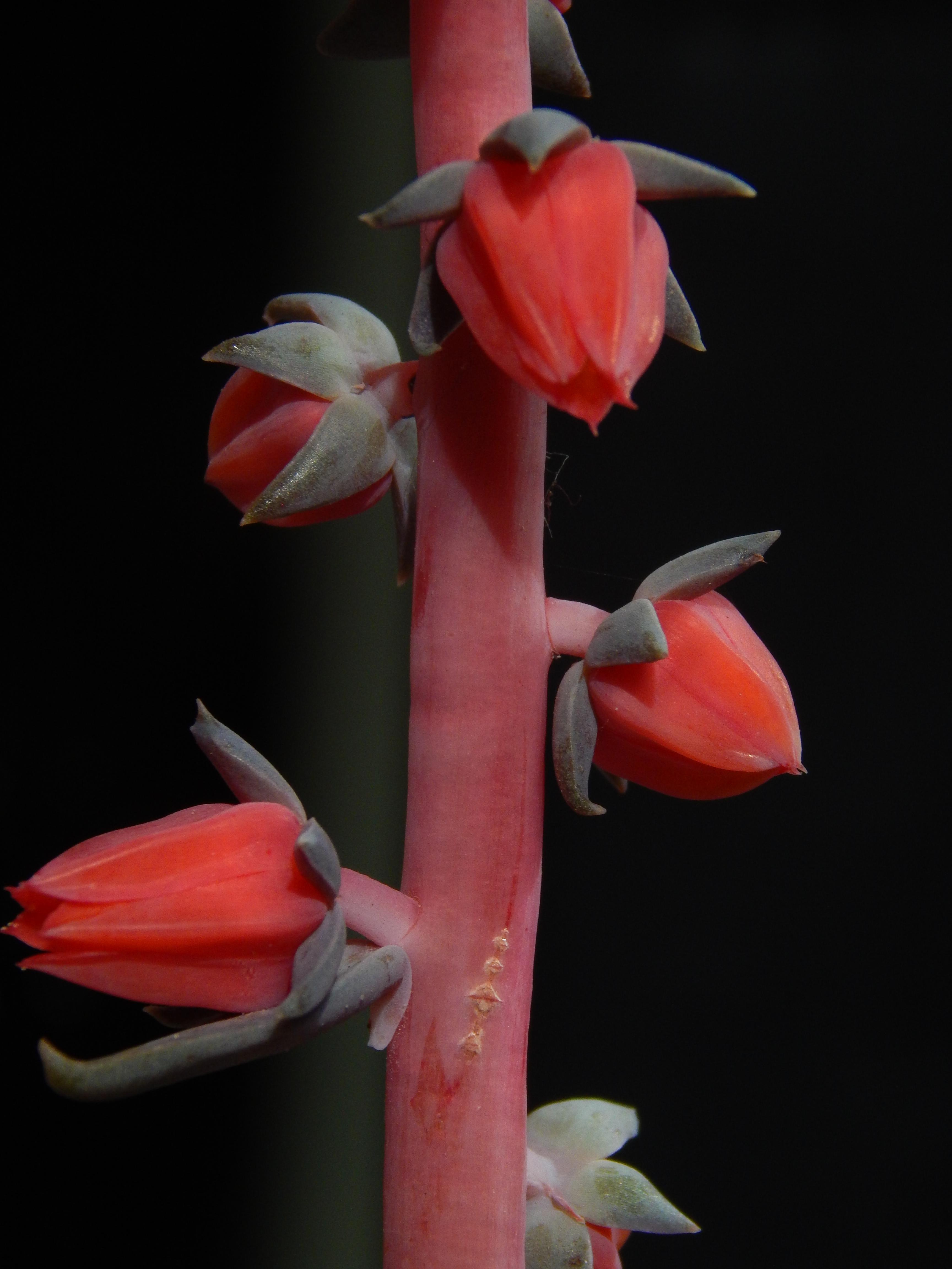 flores